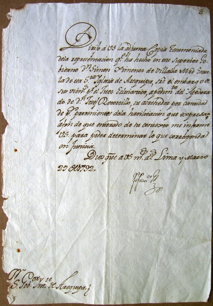 Manuscrito y firma de Gil de Taboada